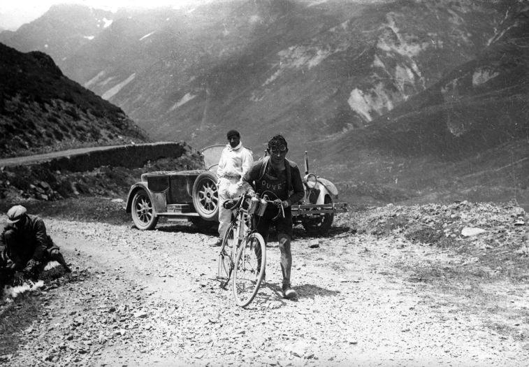 Spaarnestad Photo, SFA001006840 De Belg Maurice Geldhof beklimt een stuk van de Col de Aubisque te voet. Tour de France 1928. (Etappe Hendaye-Luchon, 387 km). Plaats onbekend. Collectie SPAARNESTAD PHOTO/Het Leven The Belgian Maurice Geldhof is climbing part of the Aubisque on foot. Tour de France 1928. (Stage Hendaye-Luchon, 387 km). Location unknown. Voor meer informatie en voor meer foto’s uit de collectie van Spaarnestad Photo, bezoek onze Beeldbank: U kunt ons helpen onze kennis van de fotocollecties te verrijken door tags en commentaren toe te voegen. Herkent u mensen of locaties of heeft u een bijzonder verhaal te vertellen bij één van de foto’s, laat dan een reactie achter (als u ingelogd bent bij Flickr) of stuur een mailtje naar: You can help us gain more knowledge on the content of our collection by simply adding a comment with information. If you do not wish to log in, you can write an e-mail to